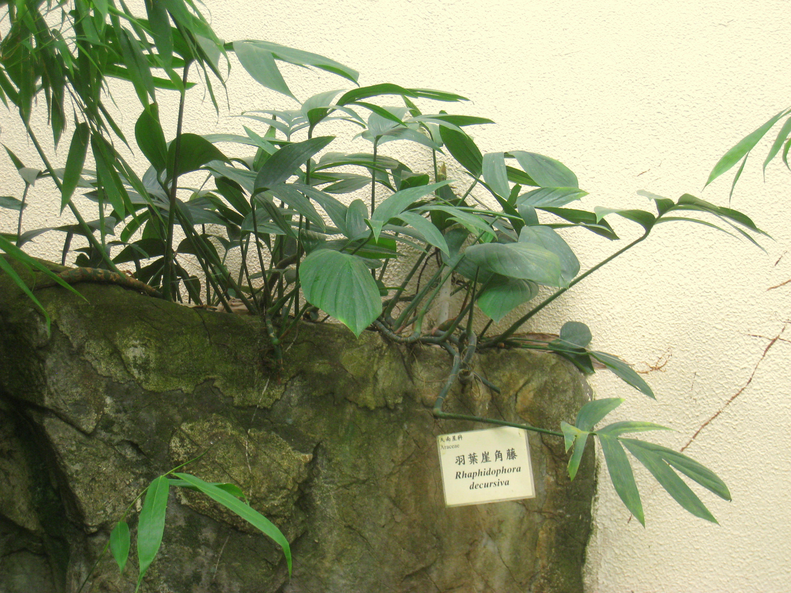 Rhaphidophora decursiva. Hong Kong Park Conservatory in Hong Kong Park, Hong Kong.